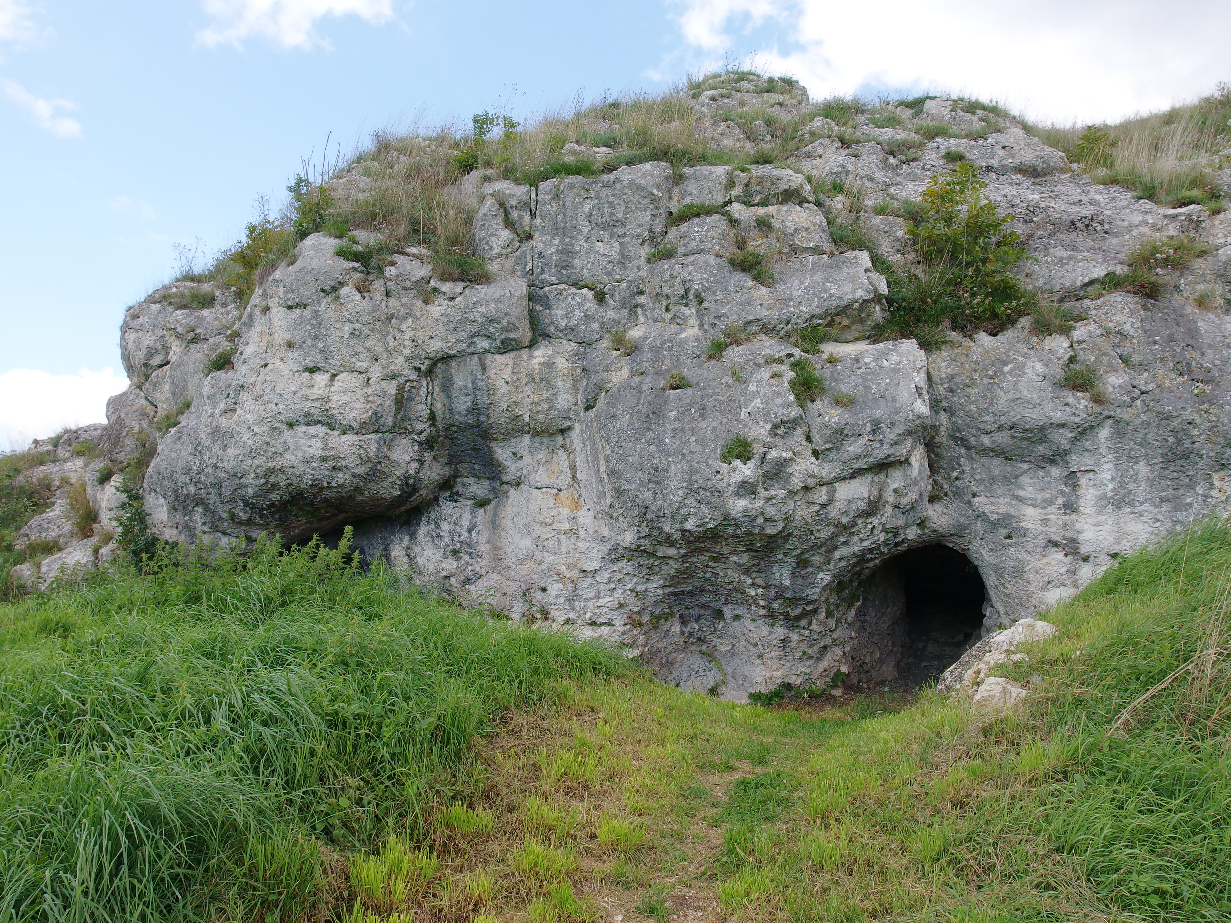 Höhle und Abri mit Funden des Jungpaläolithikums, des Mesolithikums, des Neolithikums, der Hallstattzeit, der Spätlatènezeit, der römischen Kaiserzeit, der Vökerwanderungszeit des Mittelalters.This is a photograph of an architectural monument.